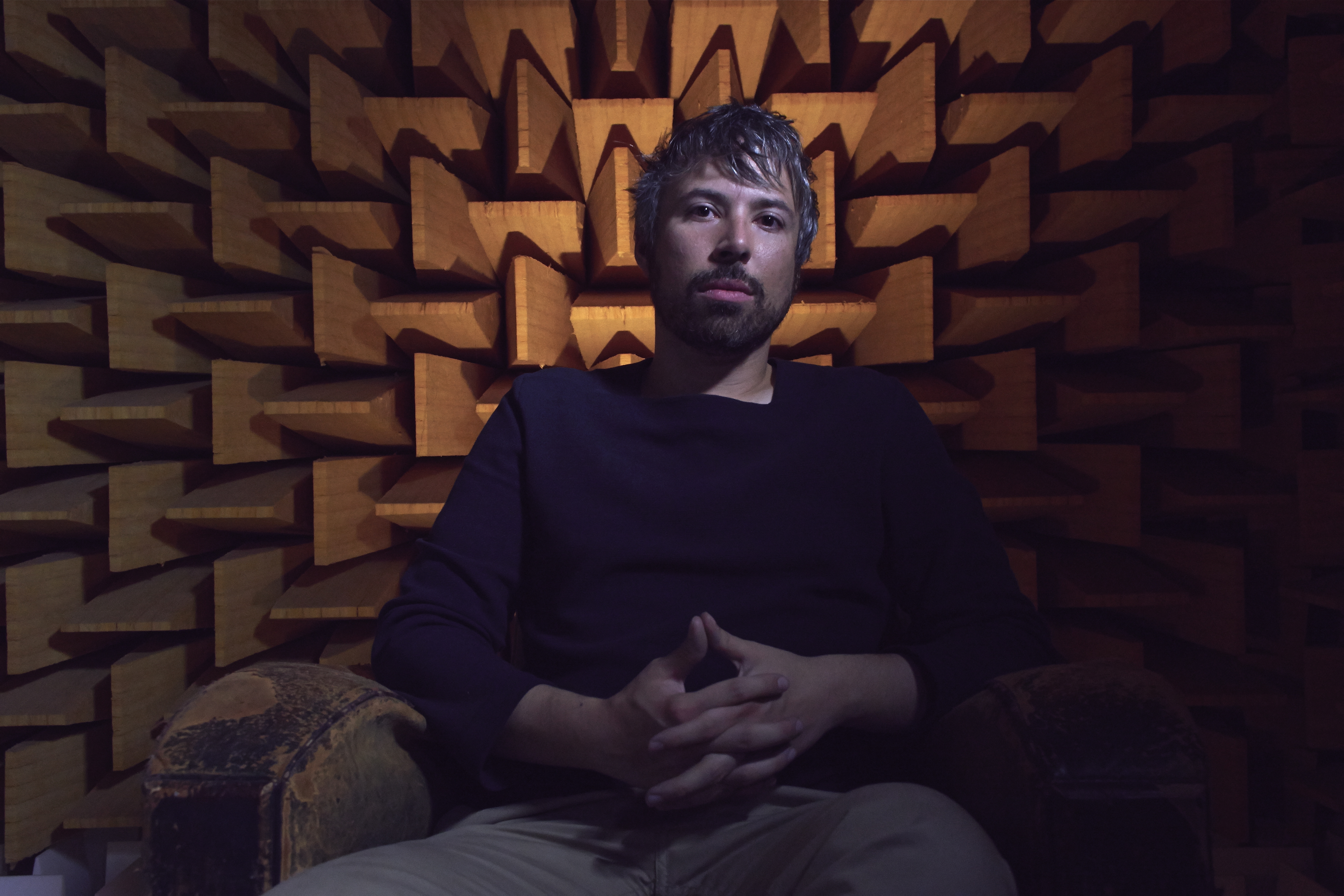 Gurwann Tran Van Gie sur le tournage d'EXPERIENCE INTEGRE